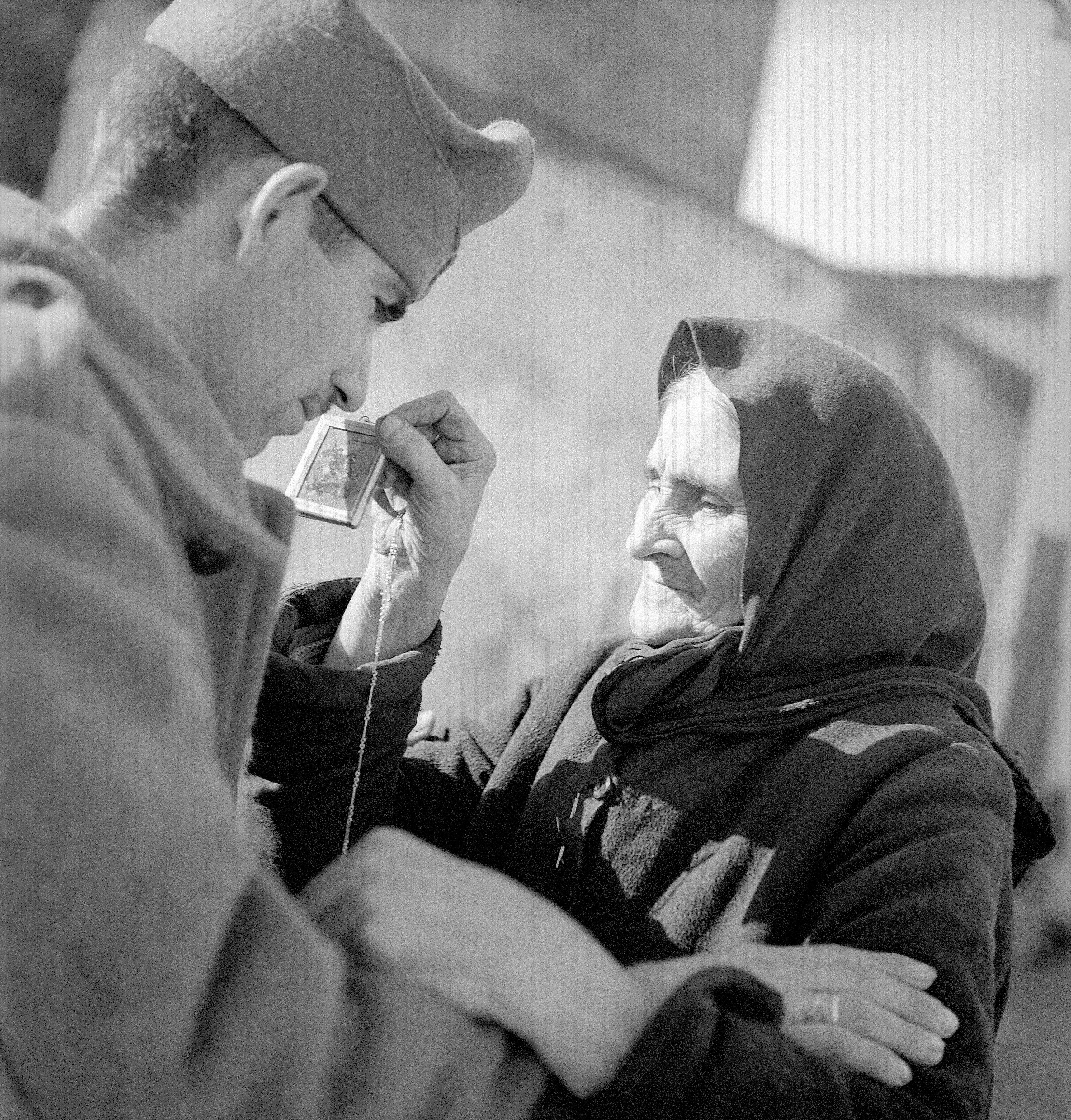 Εκδήλωση και έκθεση στο ΥΠΕΞ για τα 70 χρόνια από την κήρυξη πολέμου εναντίον της χώρας μας από τις δυνάμεις του άξονα Event and exhibition at the Foreign Ministry marking the 70th anniversary of the Axis powers’ declaration of war on Greece